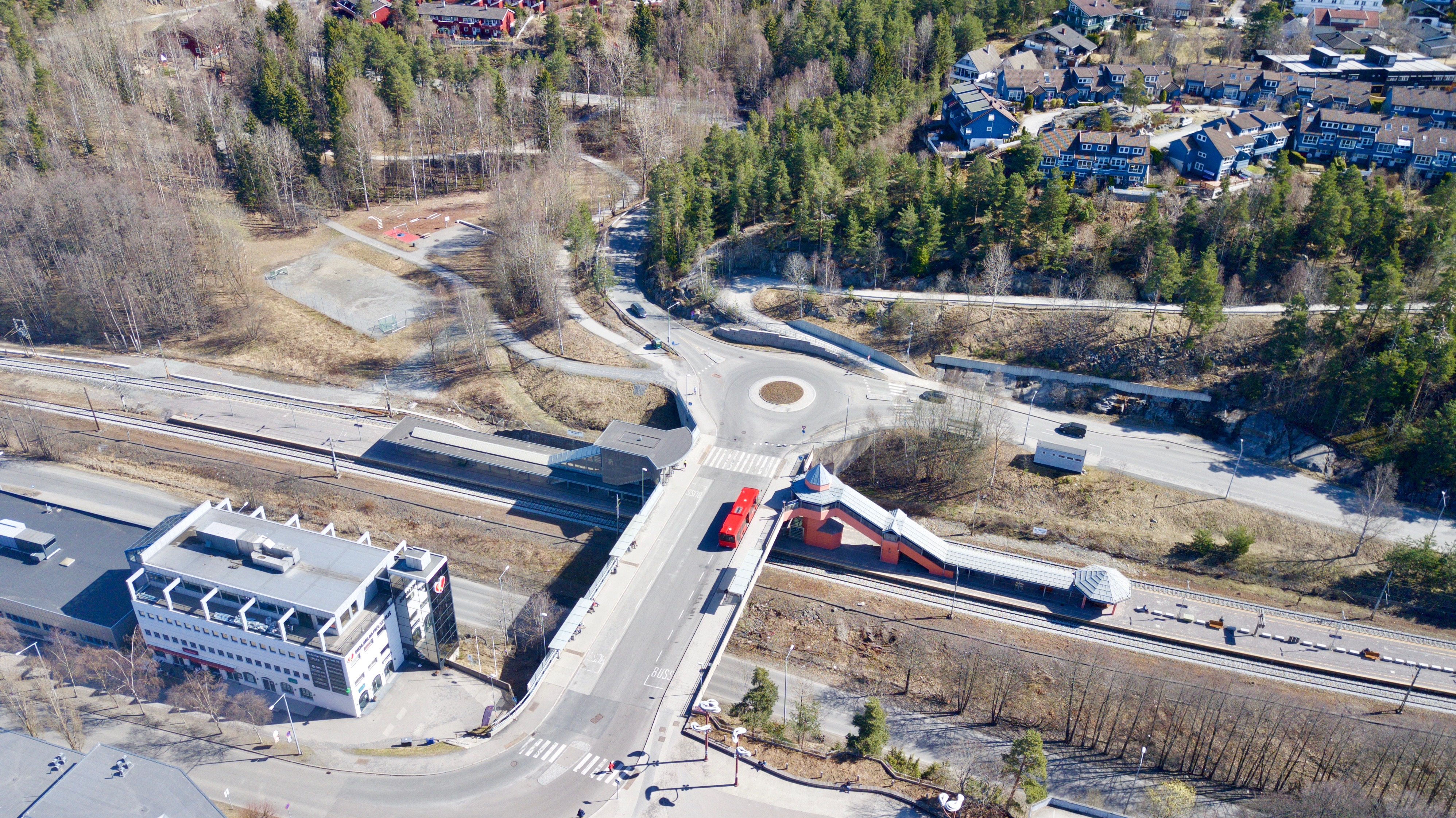 Holmlia holdeplass i Oslo.